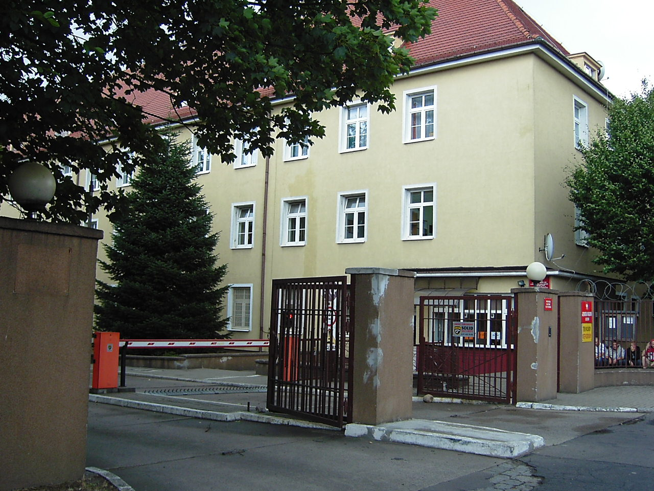 Kompleks koszarowy przy ulicy Ku słońcu w Szczecinie